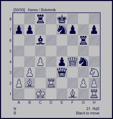 Keres-Botvinnik 1948, 5. partii - Botvinnik tegi vea 21...Lxf4?